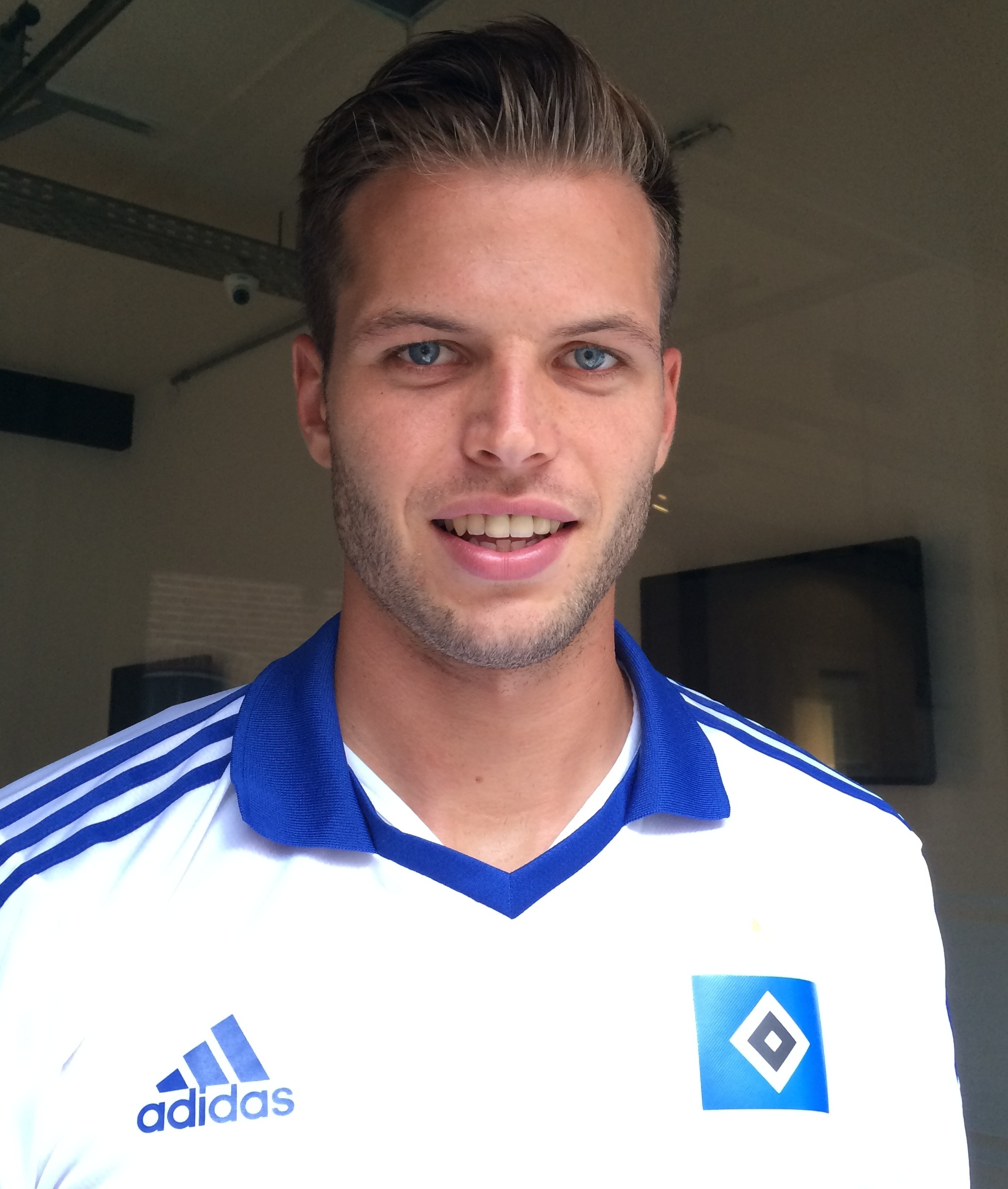 Fußballspieler Abwehr Dennis Diekmeier (HSV)